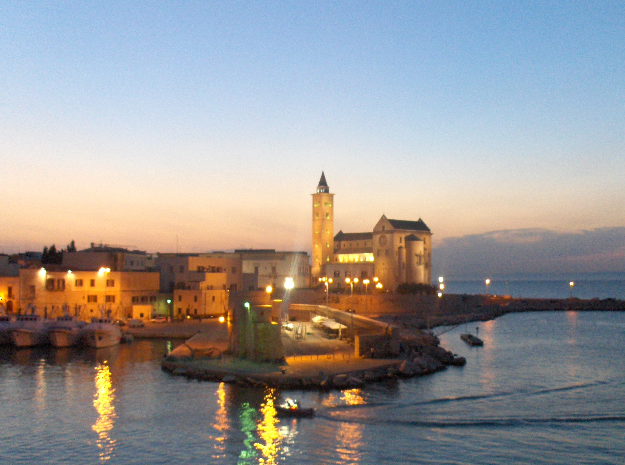 trani